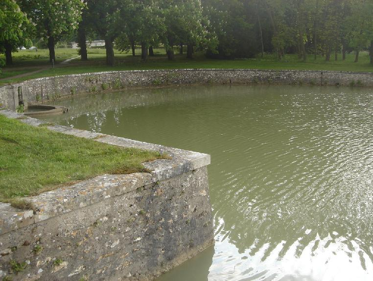 Vue du demi-cercle Sud du bassin de Bel Air, 2010.